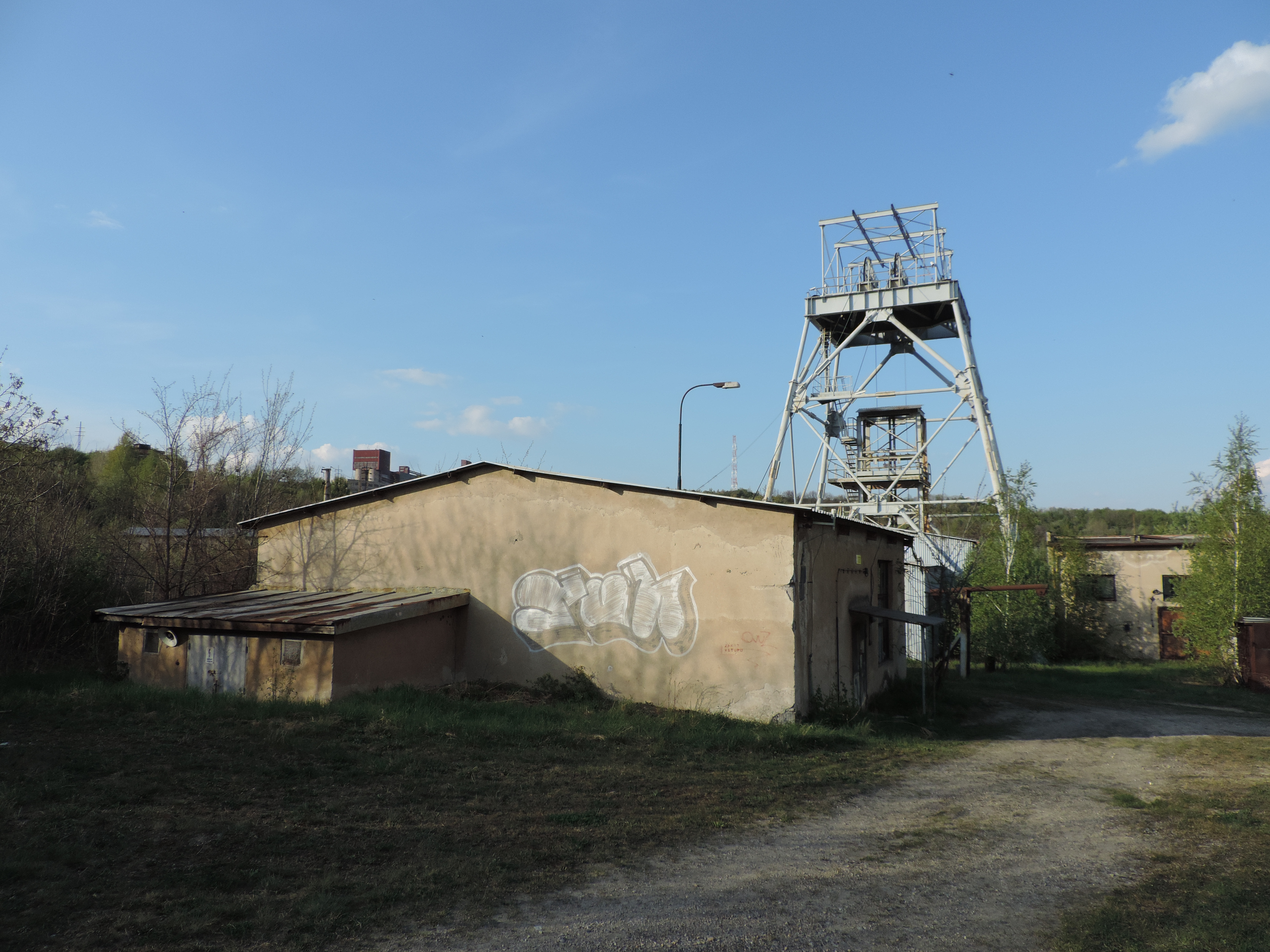 Baňa Bankov